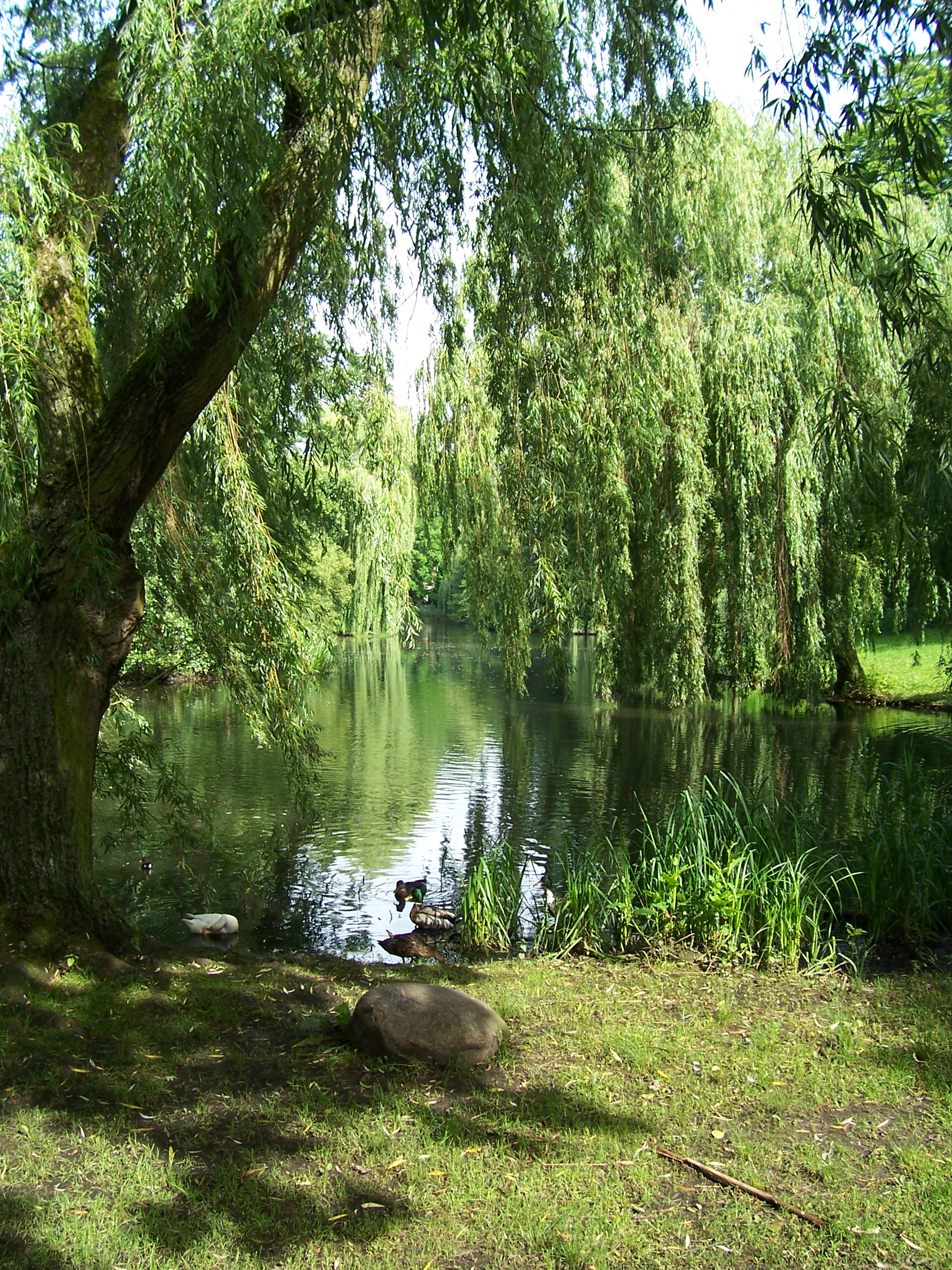 Eimsbütteler Park "Am Weiher" This is a photograph of an architectural monument.